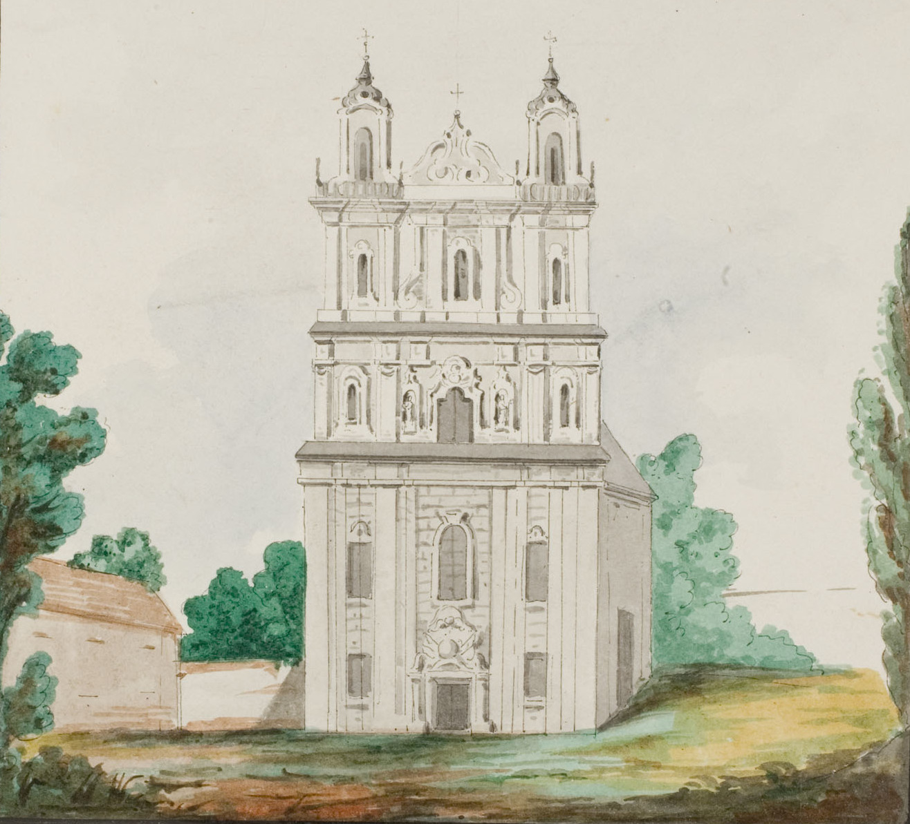 Беларуская (тарашкевіца): Вільня (Vilnia), вуліца Віленская (vulica Vilenskaja). Касьцёл Сьвятой Кацярыны і кляштар бэнэдыктынак